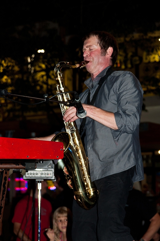 Davor Gobac i Psihomodo pop